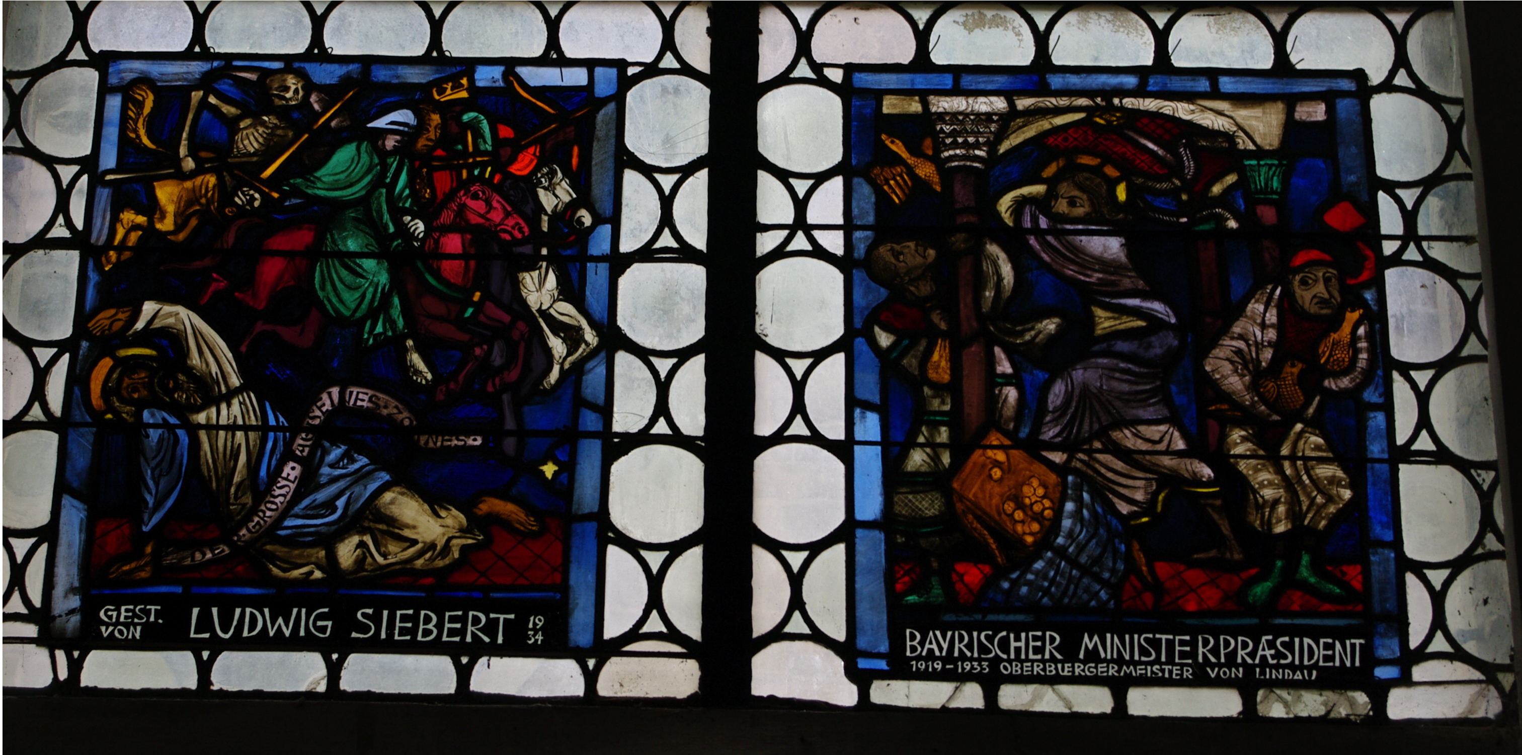 Von Ludwig Siebert, Bürgermeister von Lindau und NSDAP-Ministerpräsident von Bayern, gestiftetes Fenster in der evangelischen Kirche St. Stephan in Lindau (Bodensee).